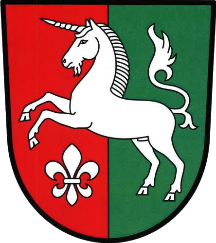 znak obce Radenice, okres Žďár nad Sázavou